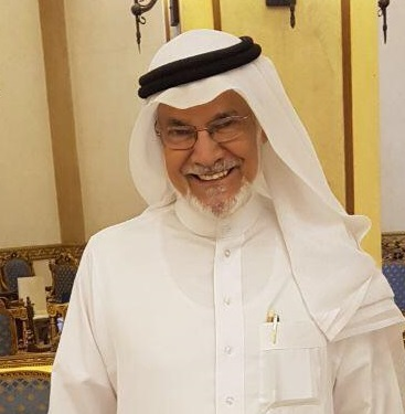 معالي الدكتور علي النملة وزير الخدمة الاجتماعية السابق